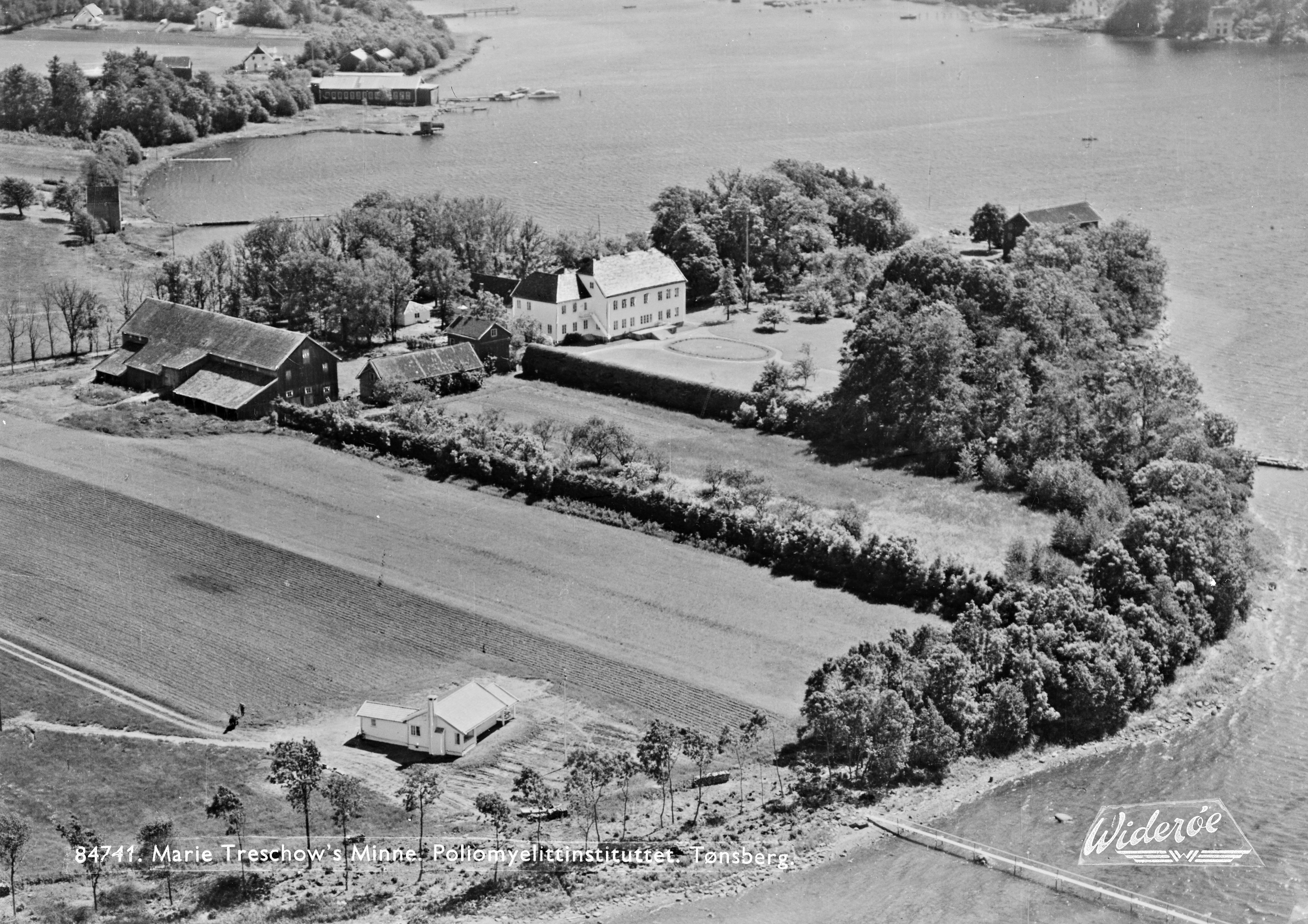 WF.S.84741 Tønsberg